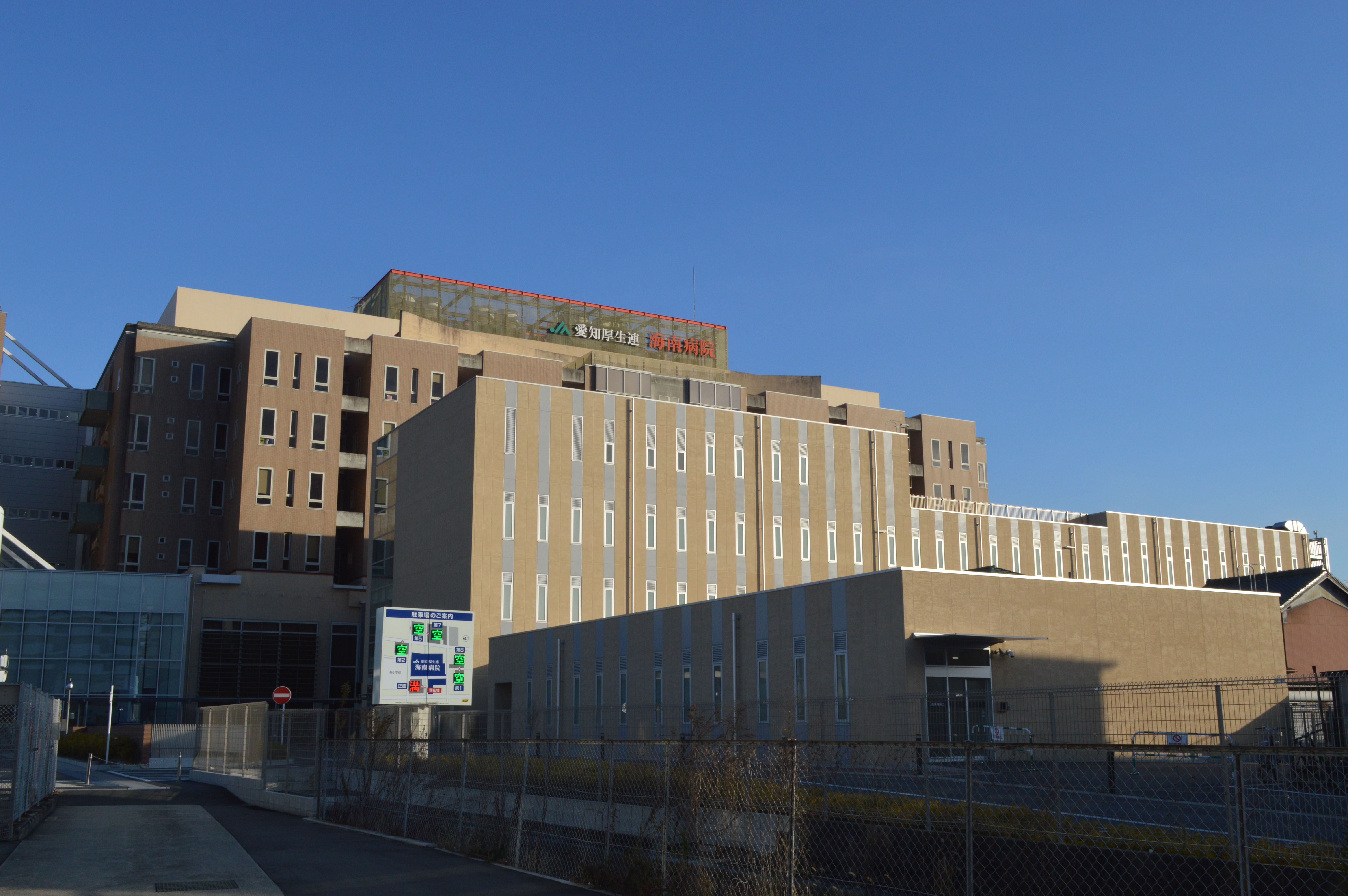 愛知県弥富市にあるJA愛知厚生連海南病院。